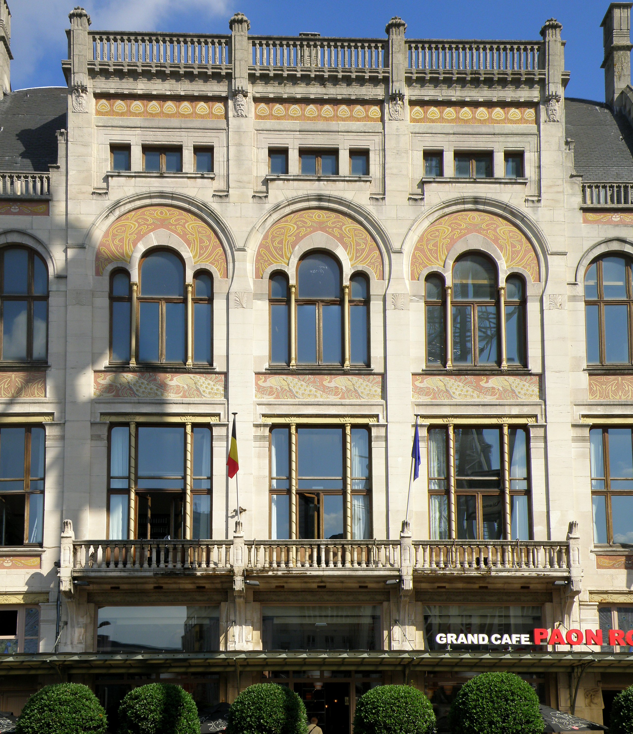 Anvers, Belgique. Café-restaurant Paon Royal, de style Art nouveau, sis Koningin Astridplein. Archit. Emile van Averbeke.